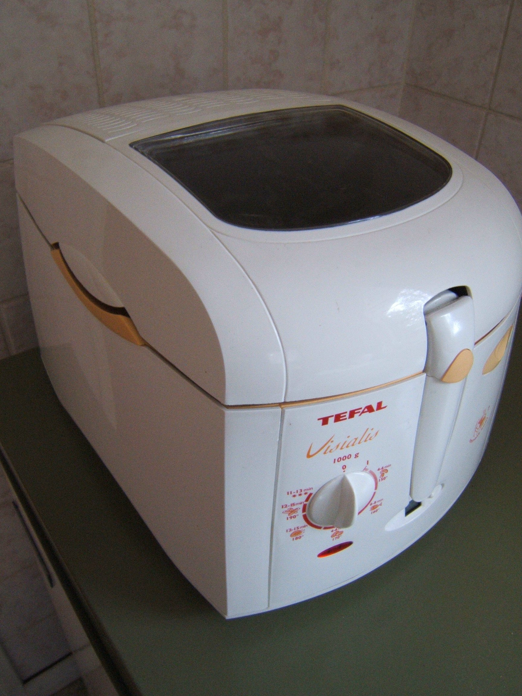 Categorie:Afbeelding voorwerp